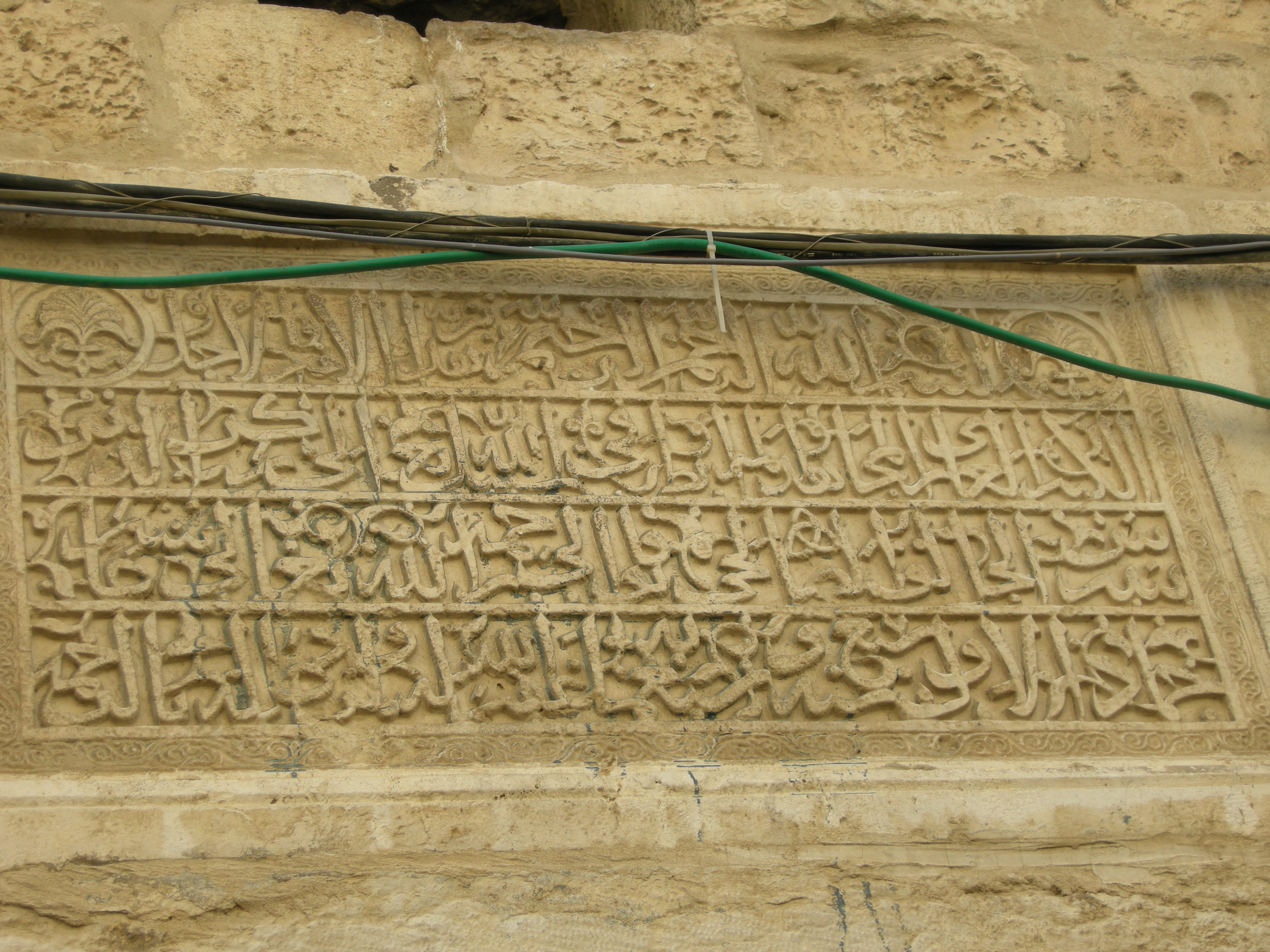 Mamluk impact on Jerusalem